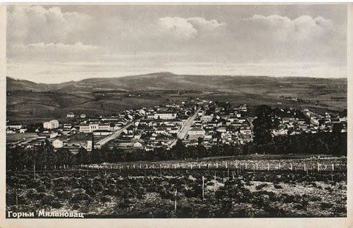 Разгледница Горњег Милановца, града у Србији, са почетка 20-ог века.